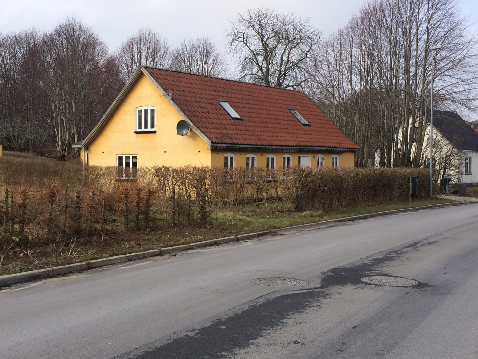 Den gamle bygning der husede Søndergårde Skole fra 1814-1877. Søndergårde er en bydel i Hadsund, Danmark